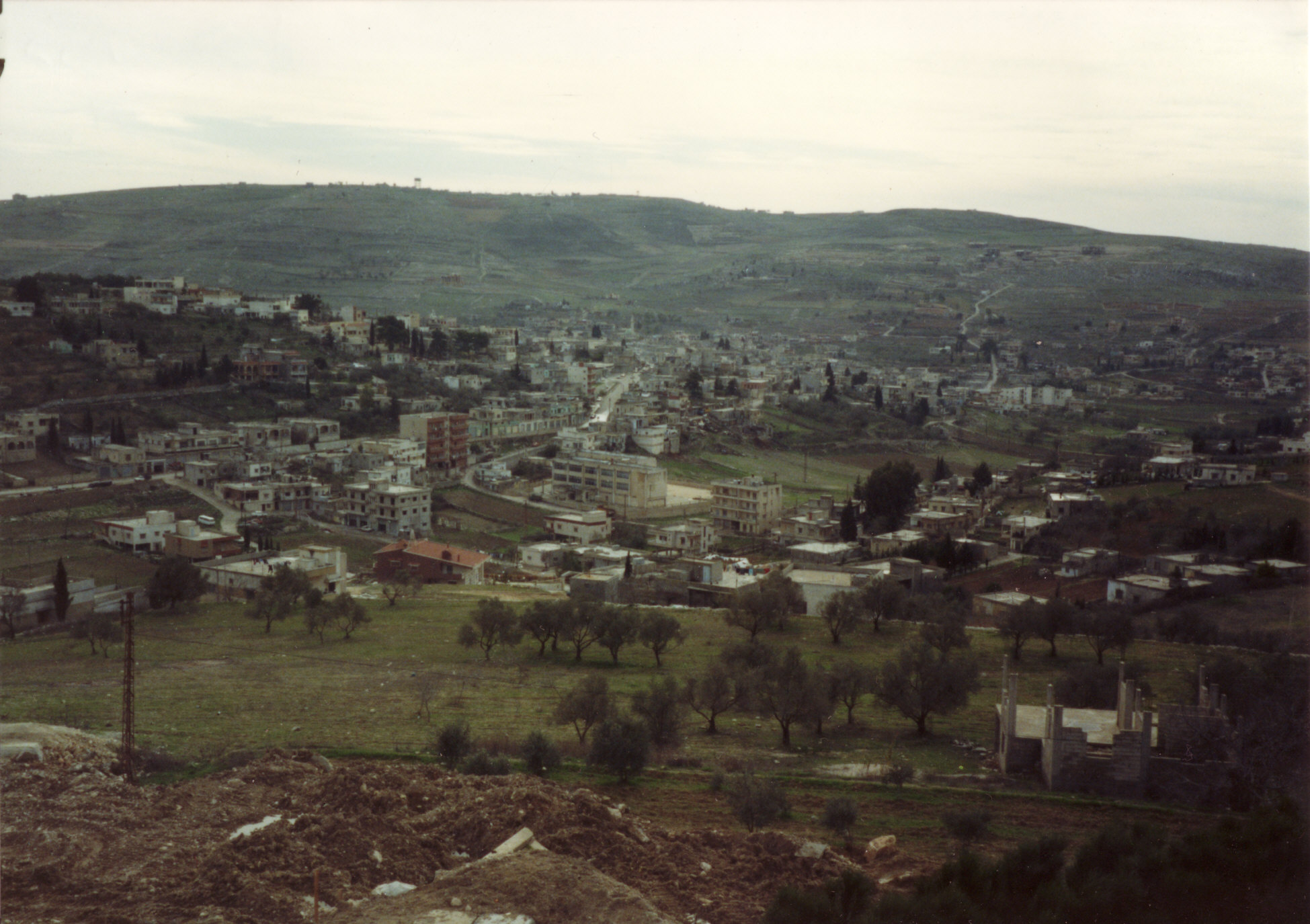 העיירה בינת ג'בייל בלבנון.